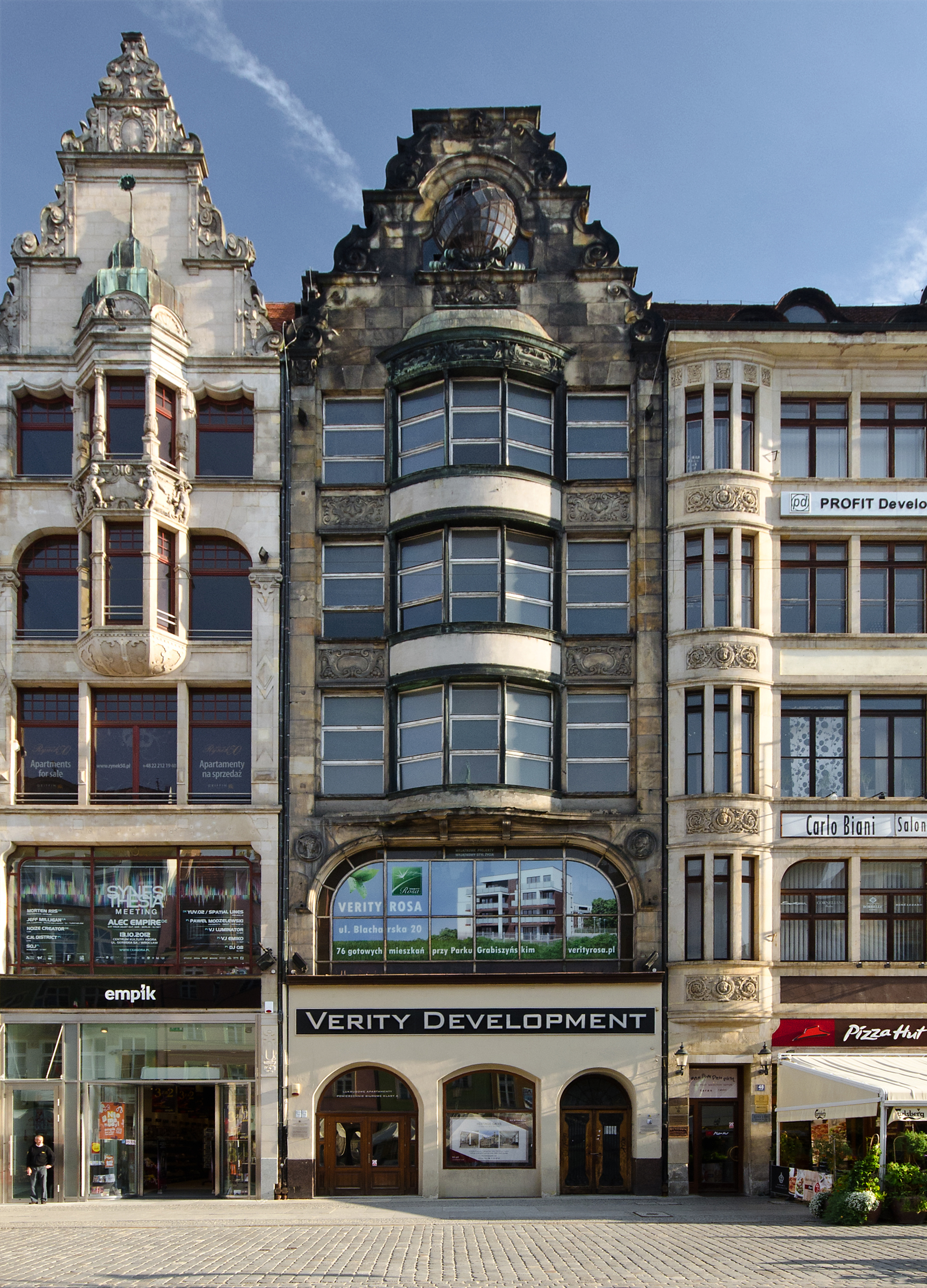 Dom handlowy Rynek 49, Wrocław - Stare Miasto